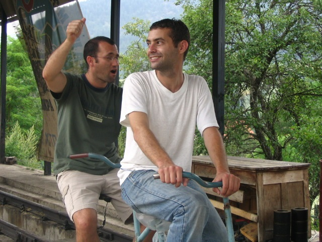 מחוץ לכפר של קוסטוריצה, מתוך הסרט "חלום קוסטוריצה", בבימויו של איל סיבי, 2013